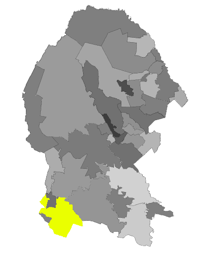 Distrito 6 Federal en Coahuila